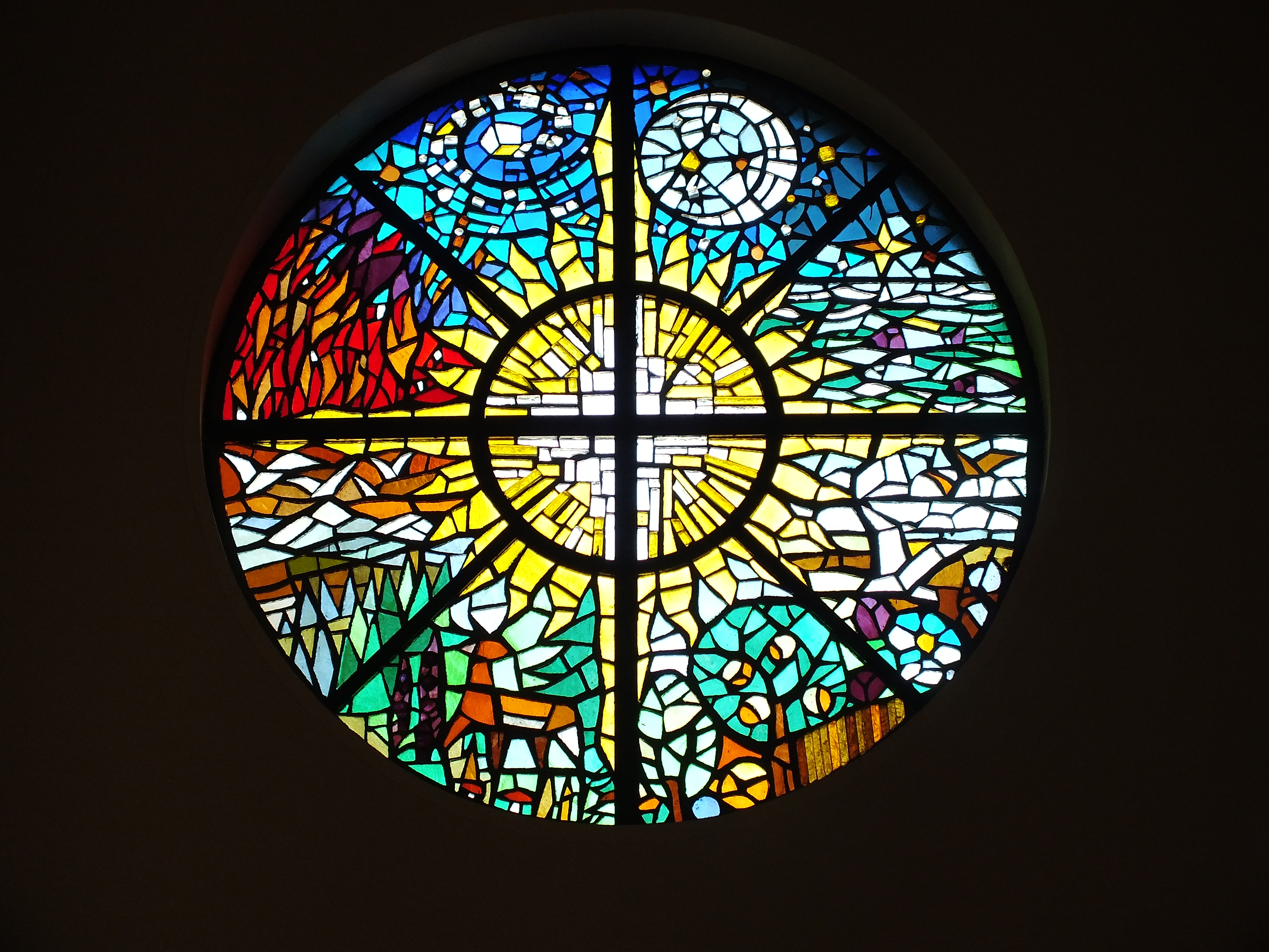 Berlin-Friedrichshagen: katholische Kapelle St. Franziskus, Altarfenster